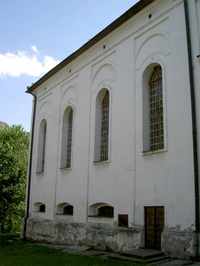 Tarnogród, Poland - Synagogue (now library), side view • Tarnogród, Polska - Synagoga (obecnie biblioteka), widok z boku